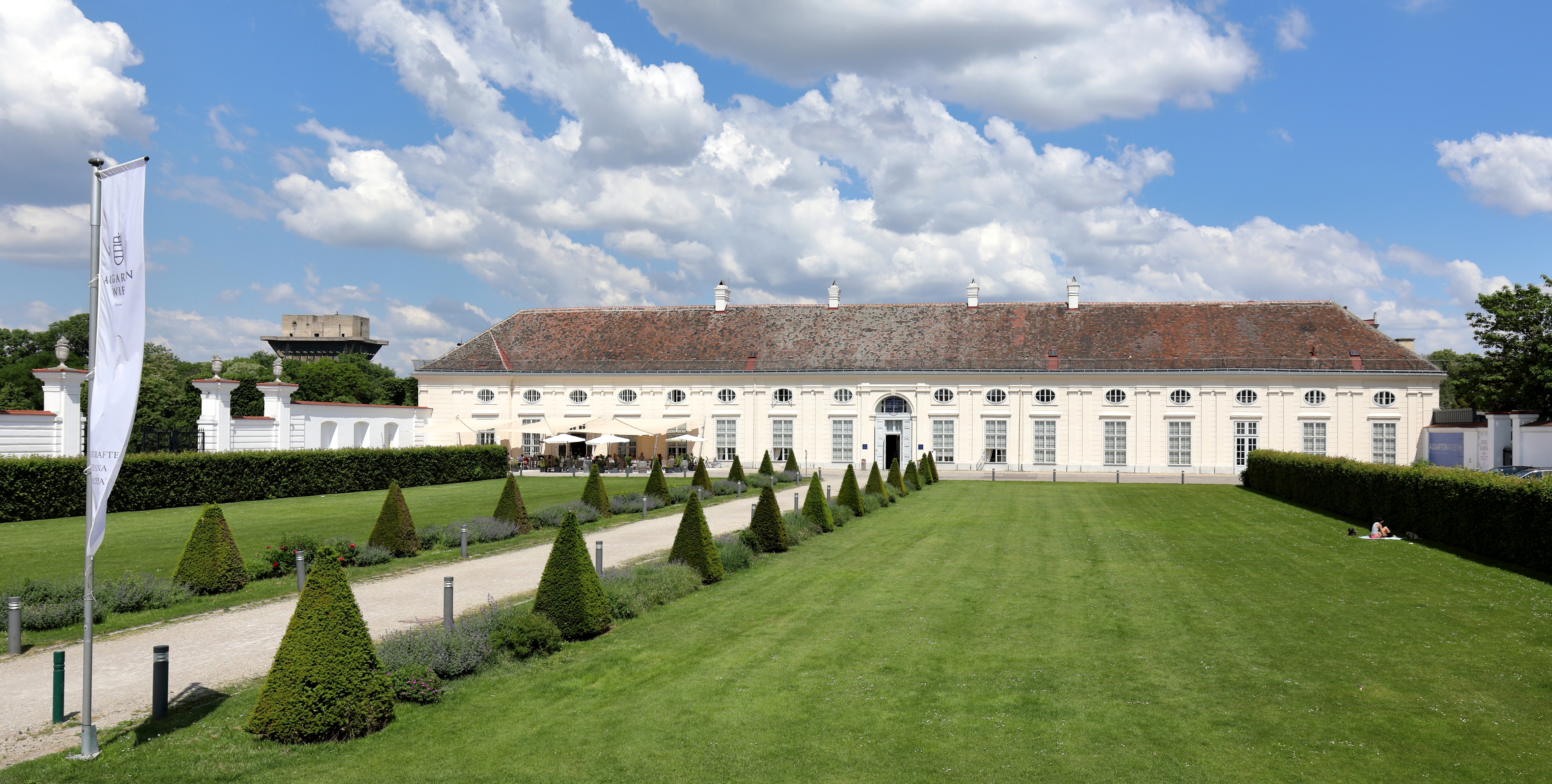 Das Schloss Augarten bzw. die Porzellanmanufaktur Augarten im 2. Wiener Gemeindebezirk Leopoldstadt und links hinten einer der beiden Flaktürme des Augartens. Das ursprüngliche Schloss wurde im Zuge der 2. Wiener Türkenbelagerung 1683 zerstört. Kaiser Joseph I. ließ 1705 auf den Resten des nordöstlichen Seitenflügels einen länglichen Saalbau errichten. Seit 1923 ist die Wiener Porzellanmanufaktur darin untergebracht, die darin aktuell (2018) ein Museum betreibt.